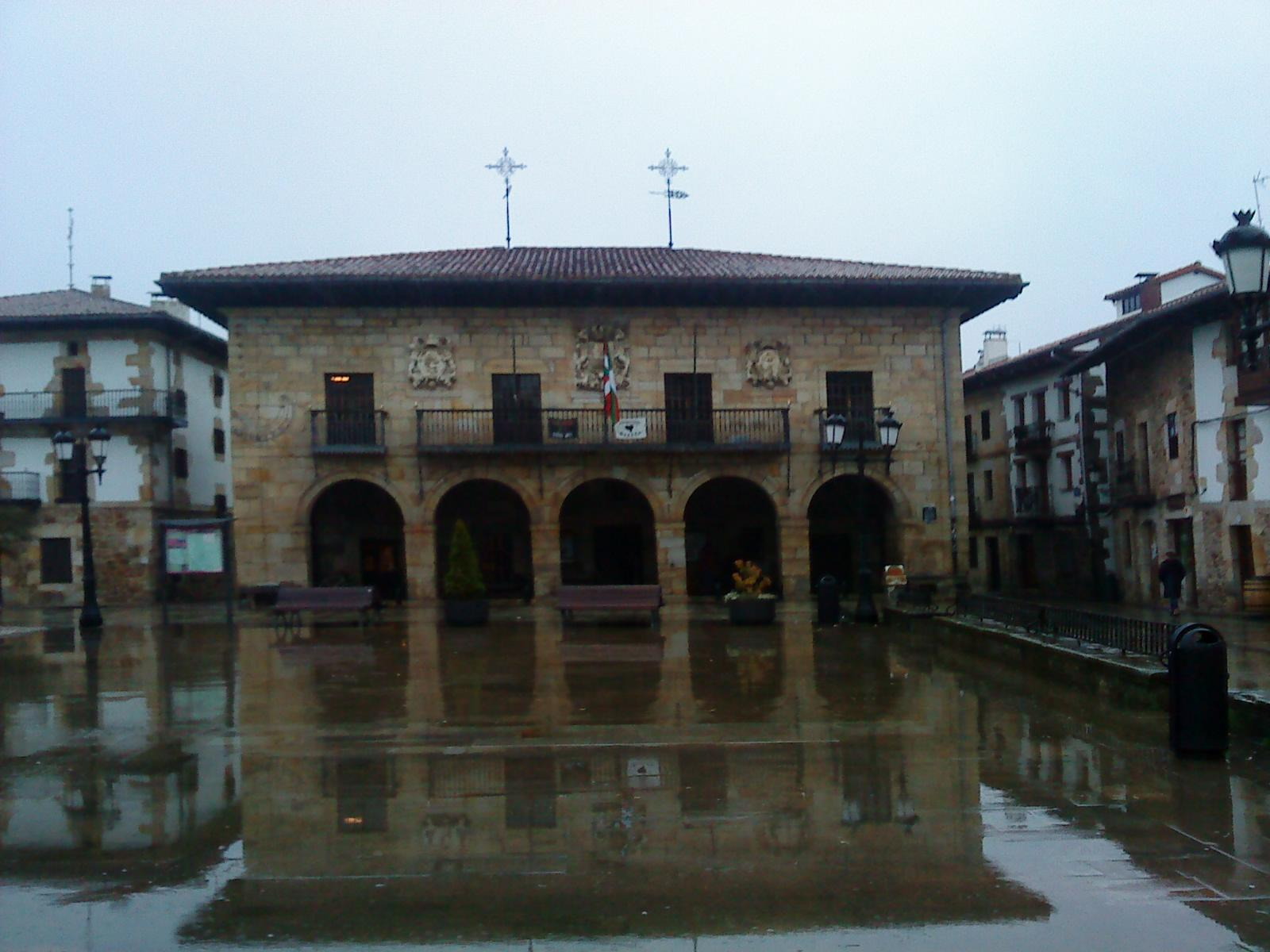 Casa consistorial de Otxandio, en Vizcaya País Vasco (España)